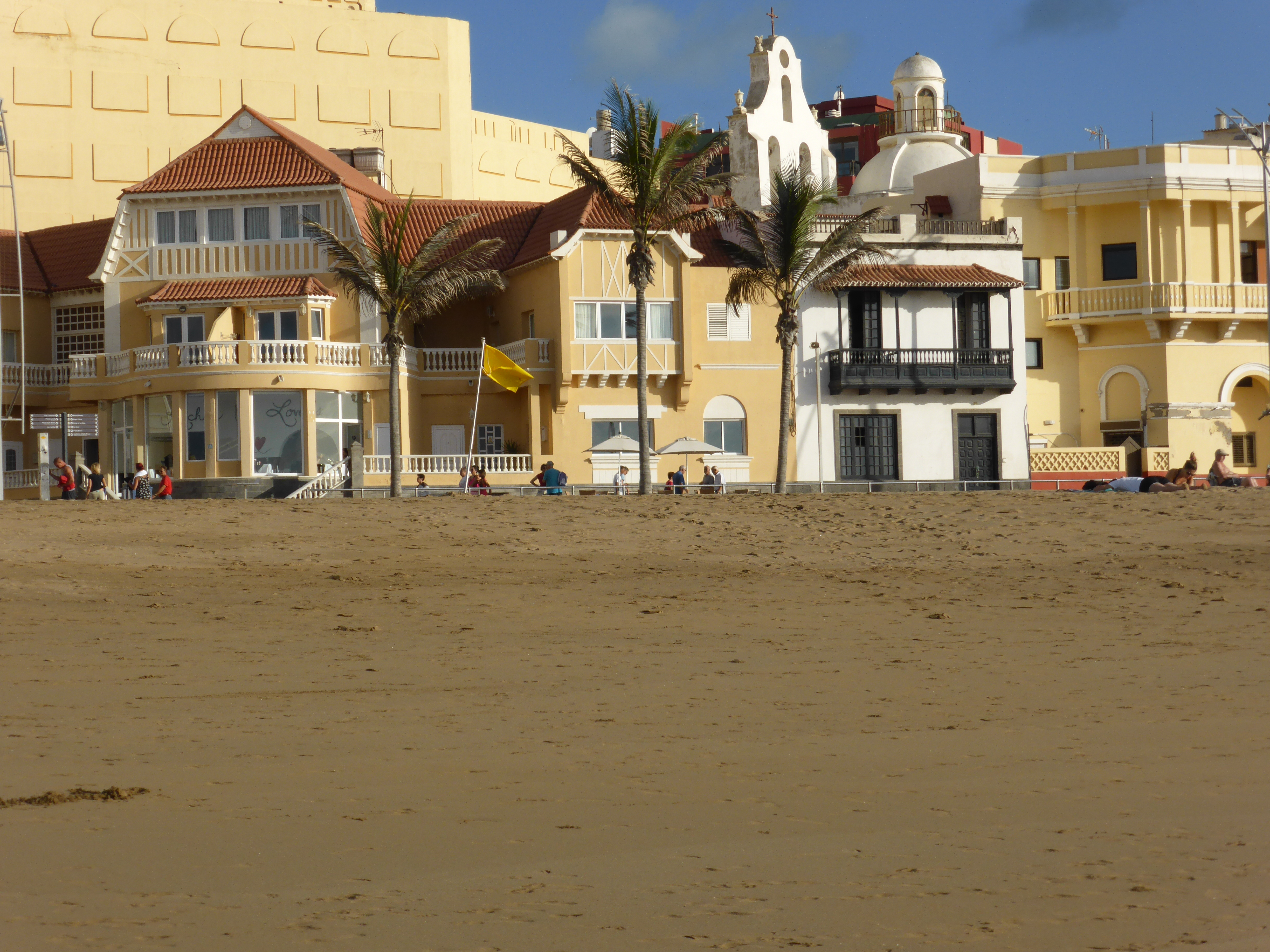 Algunas casas frente a la playa de Las Canteras, en la zona de Playa Grande. Casa con balcón neo-canario, y a su derecha esquina de la Clínica de San José.